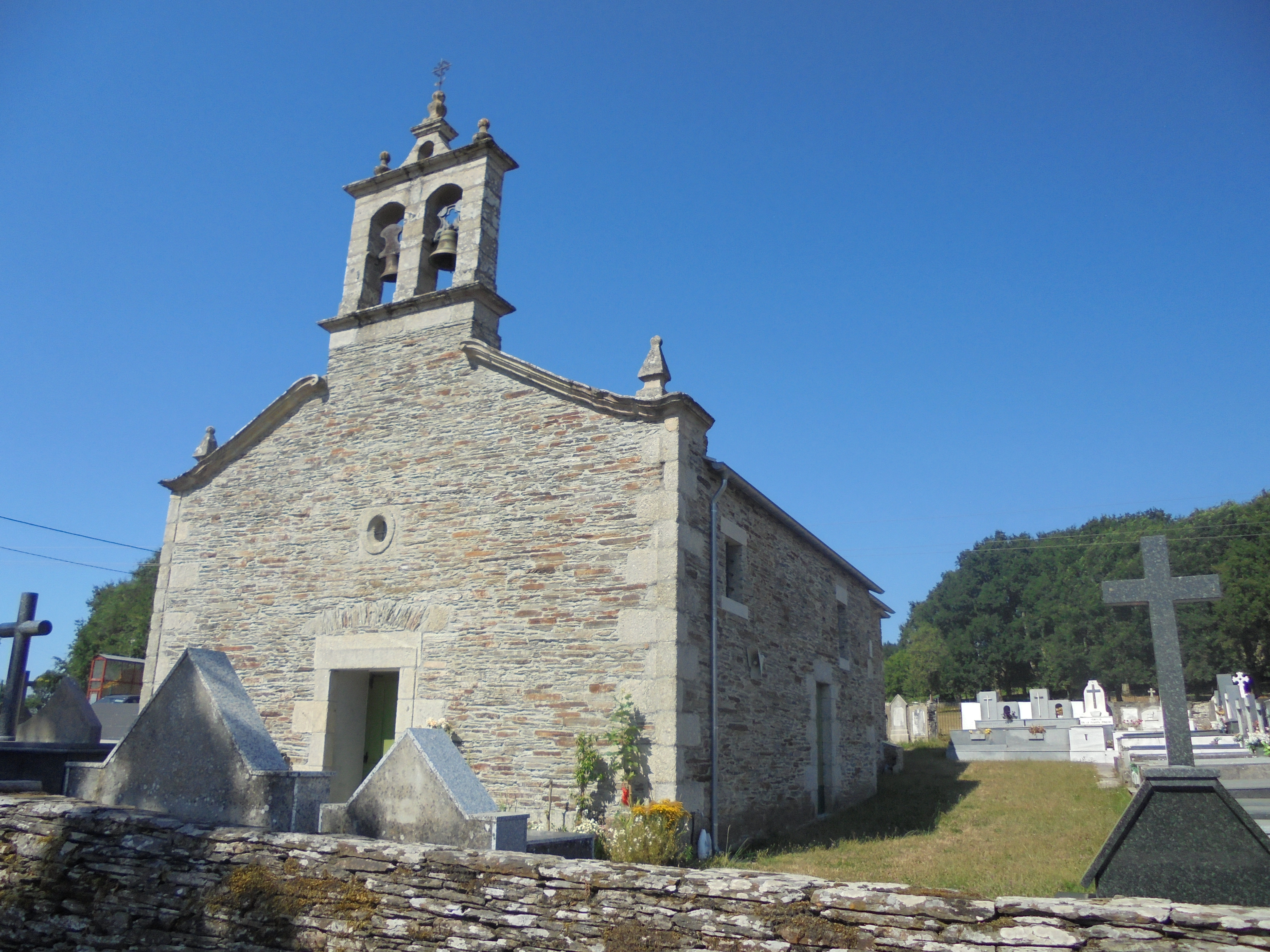 Igrexa parroquial de San Xoán de Pena ( Lugo)